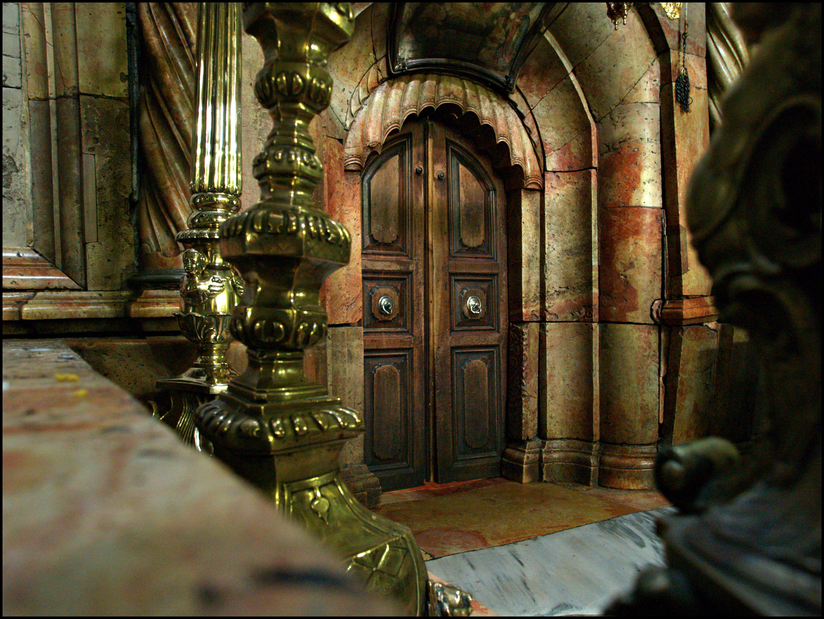 Дверь, ведущая в Кувуклию. Храм Гроба Господня в Иерусалиме